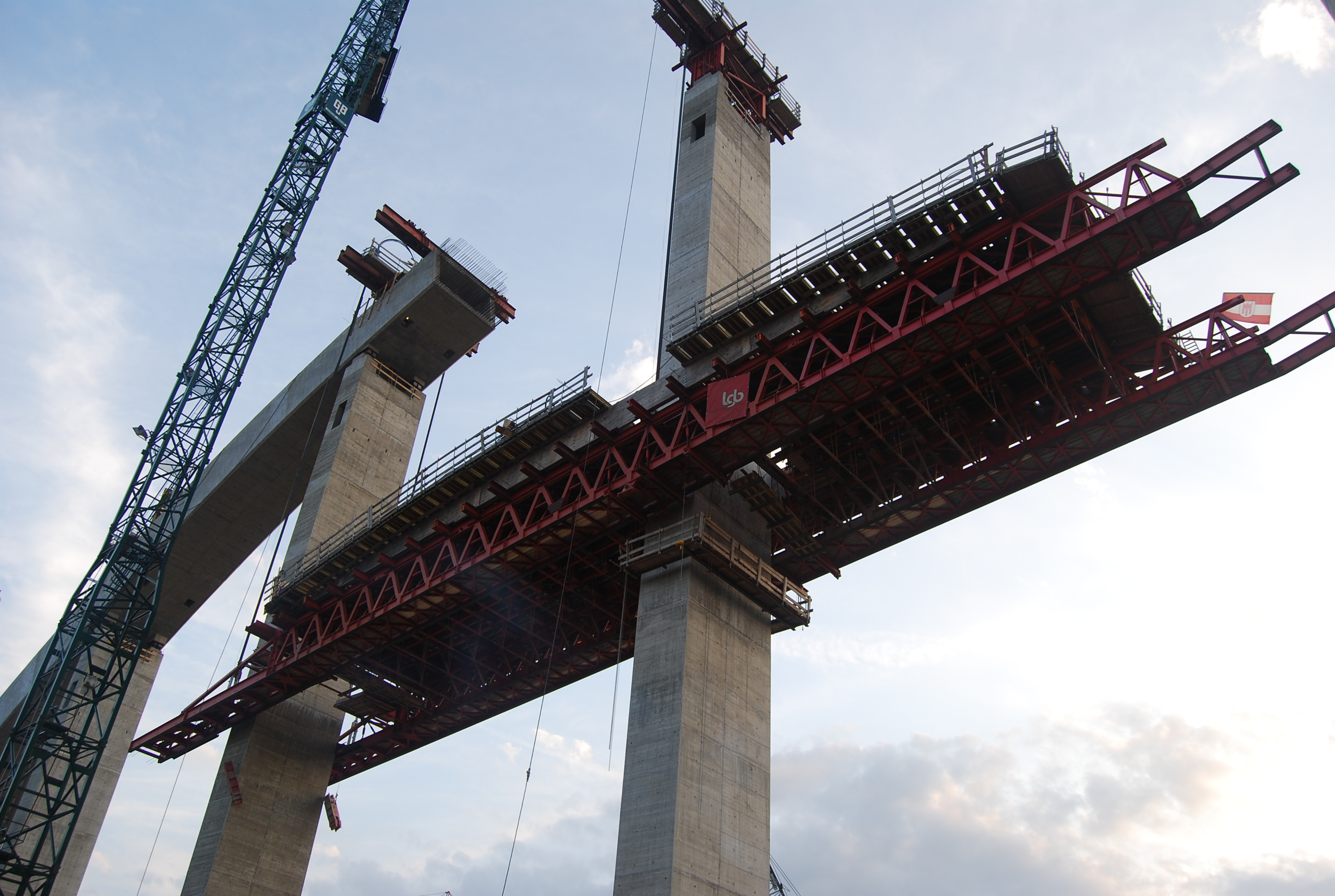 Grümpentalbrücke, Heben des 500t Lehrgerüstes inklusive der Bogenbodenschalung